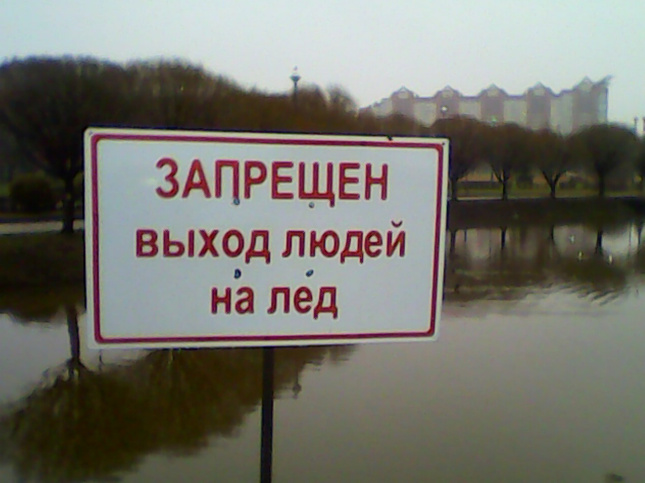 Запрещён выход людей на лёд!